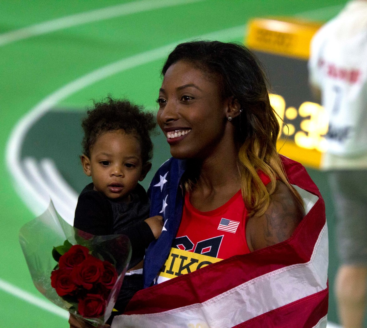 291 nia ali winnares 60mH